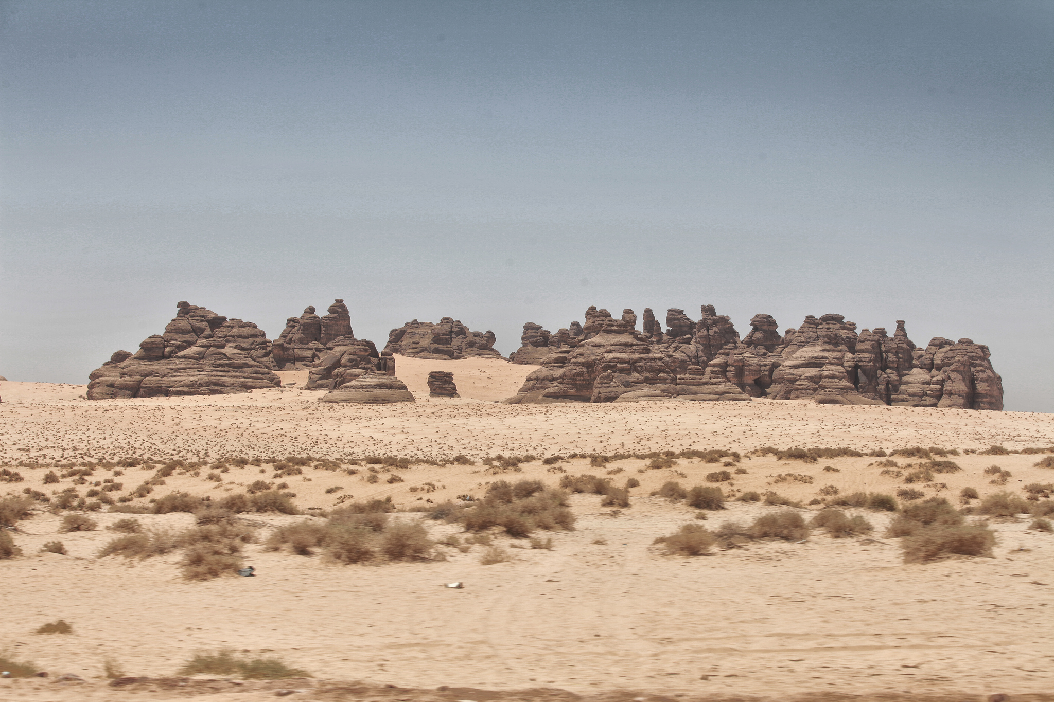 آثار تعود لمملكة لحيان التي يرجع تاريخها إلى ما قبل الميلاد، تقع على إحداثيات: 26°48′51″N 37°56′51″E ، العلا - السعودية.